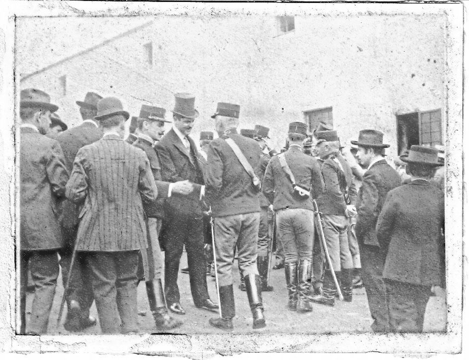 Implantação da República em S. Miguel (Açores), 09/10/1910: Francisco Luís Tavares (com cartola) conversa com o ten-cel. Virgílio Soares de Albergaria